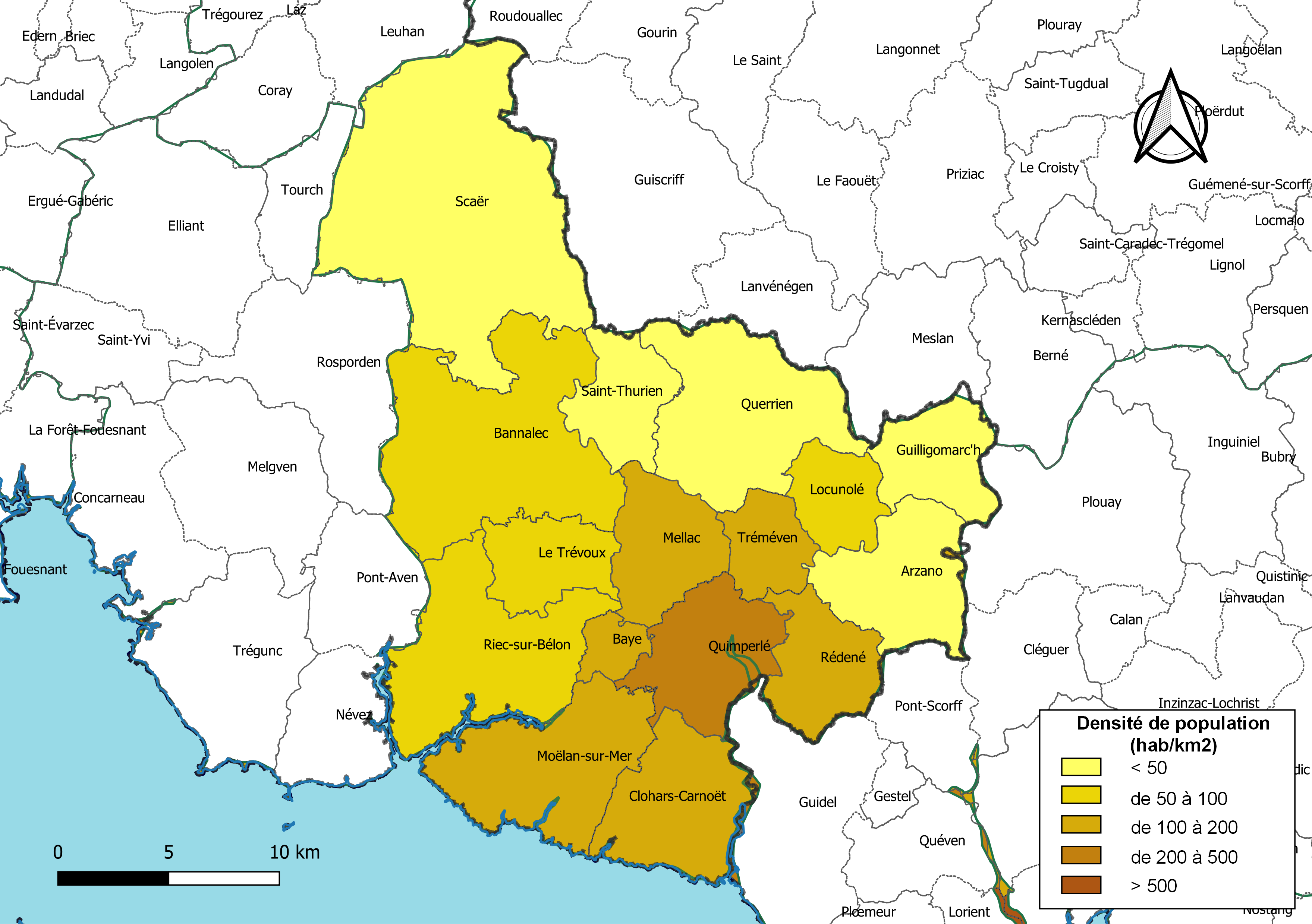 Carte des densités de population (millésimée 2016) des communes de l'intercommunalité Quimperlé Communauté, département du Finistère, France. Composition au 1er janvier 2019.